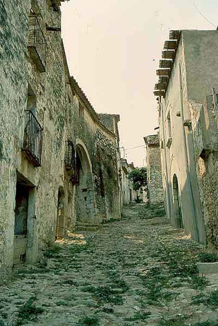 Xert (Castellón) - poble vell. 1988